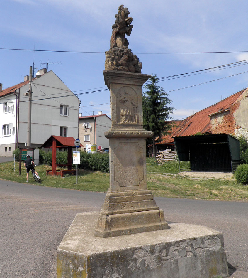 Socha Krista na Hoře Olivetské (Kněžice), střed obce, Kněžice